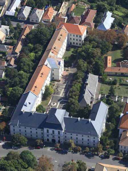 Sárospataki Református Kollégium Gimnáziuma, légi fotó